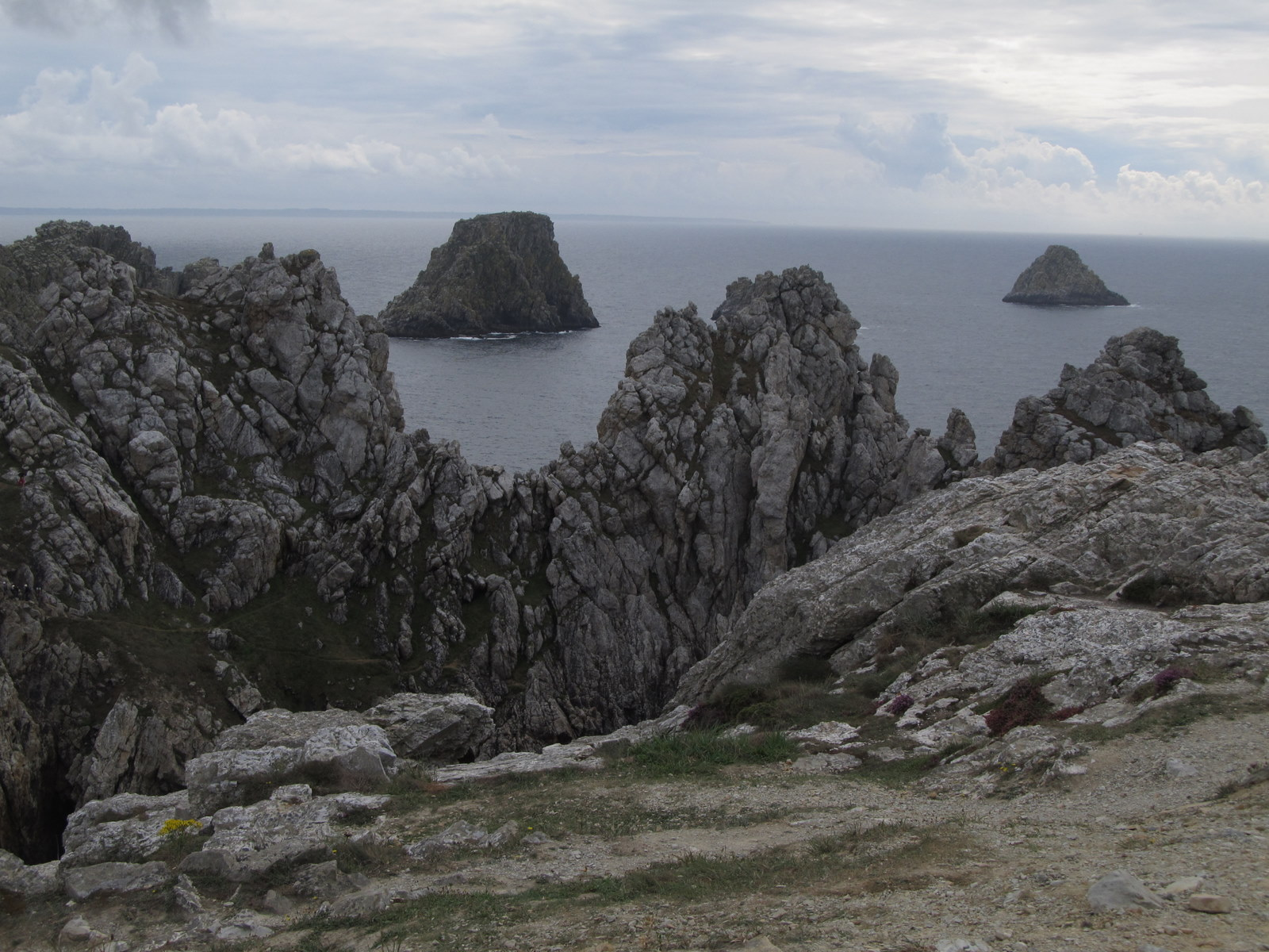 Pointe de Pen-Hir